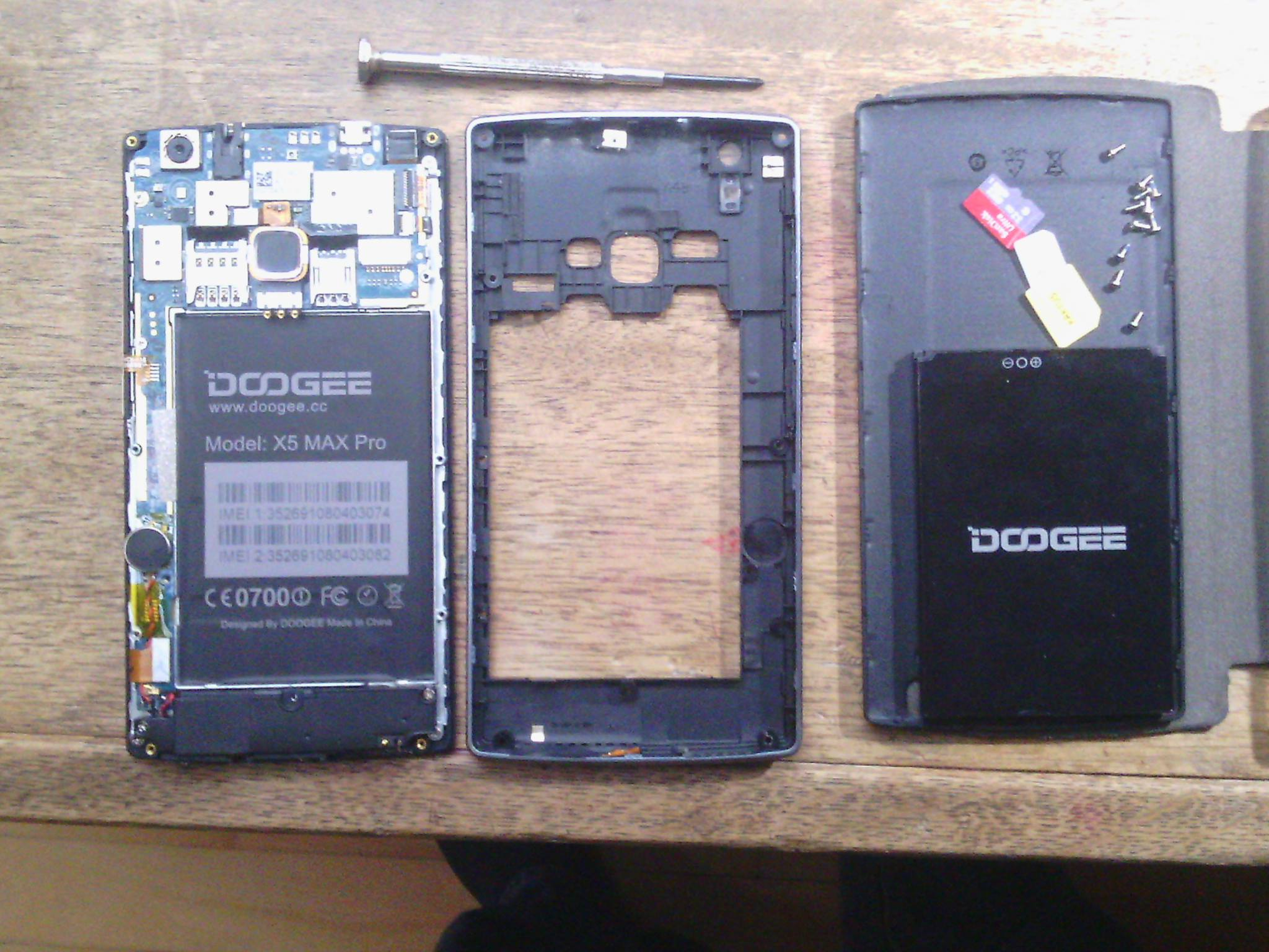 Částečně rozebraný telefon